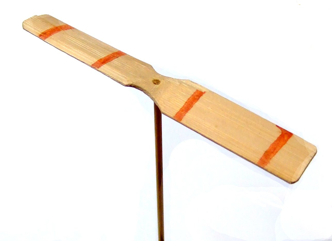 Taketombo. Photo taken in Tokyo Japan.